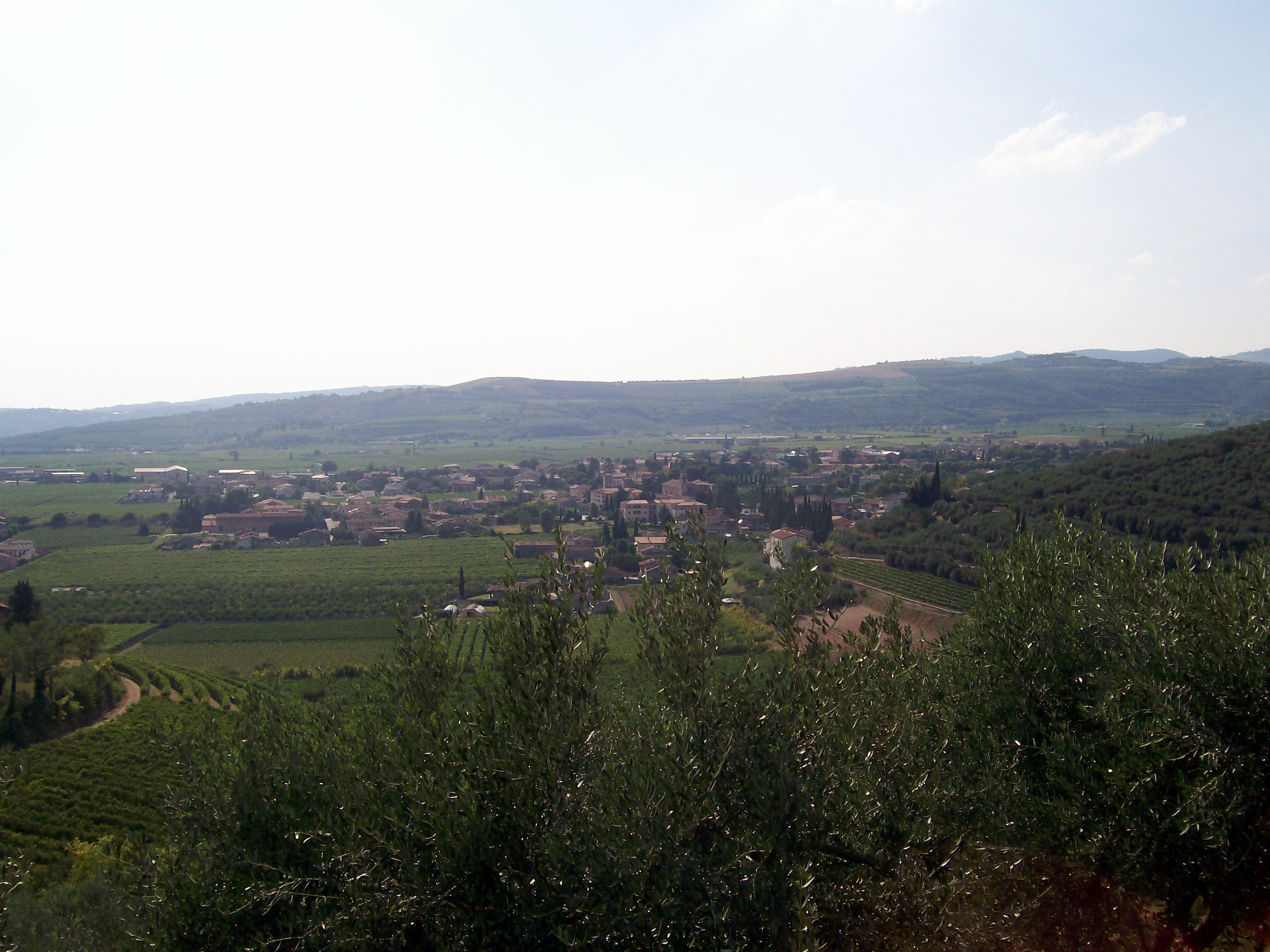 Veduta del centro di Illasi (VR).